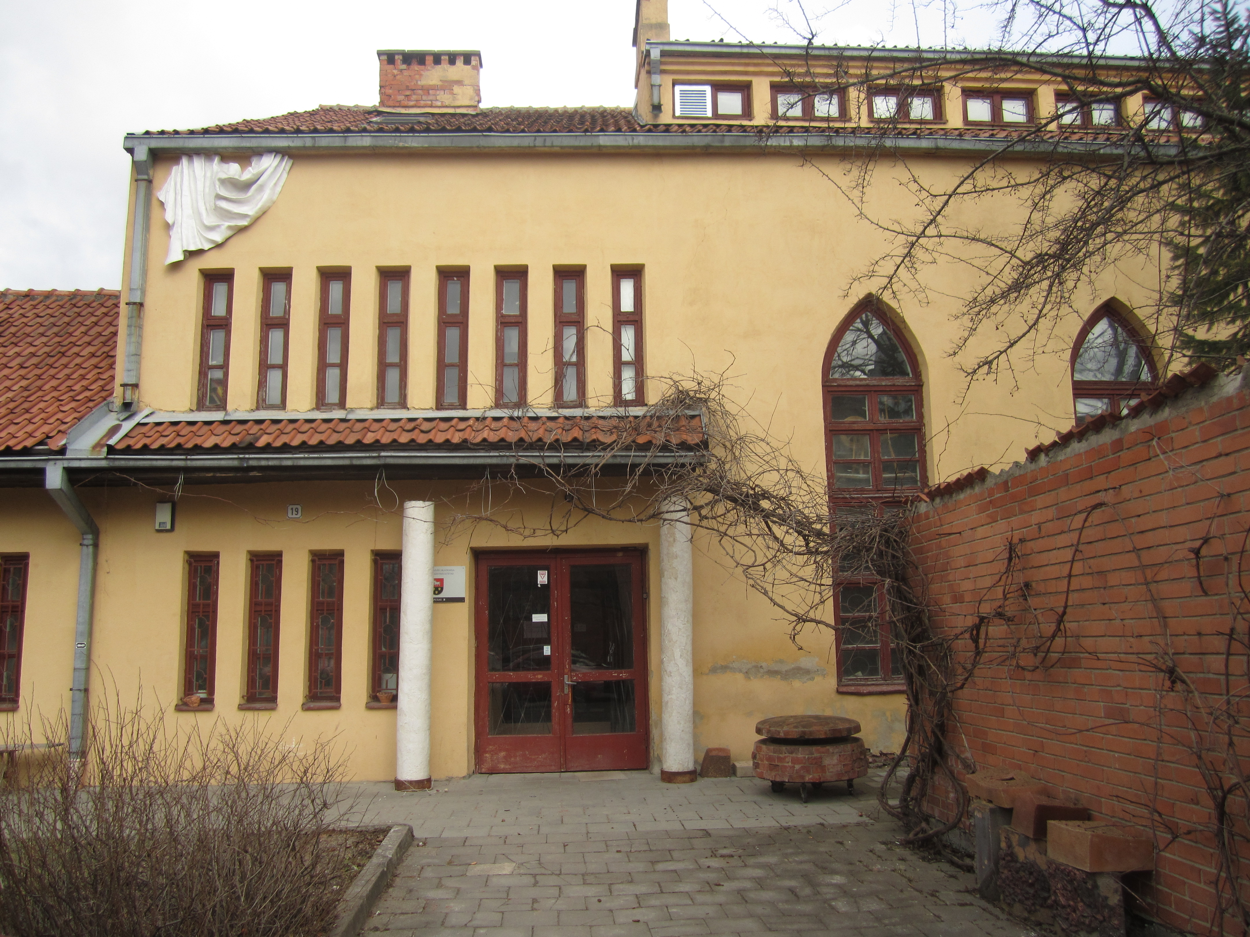 Tekstilės katedra